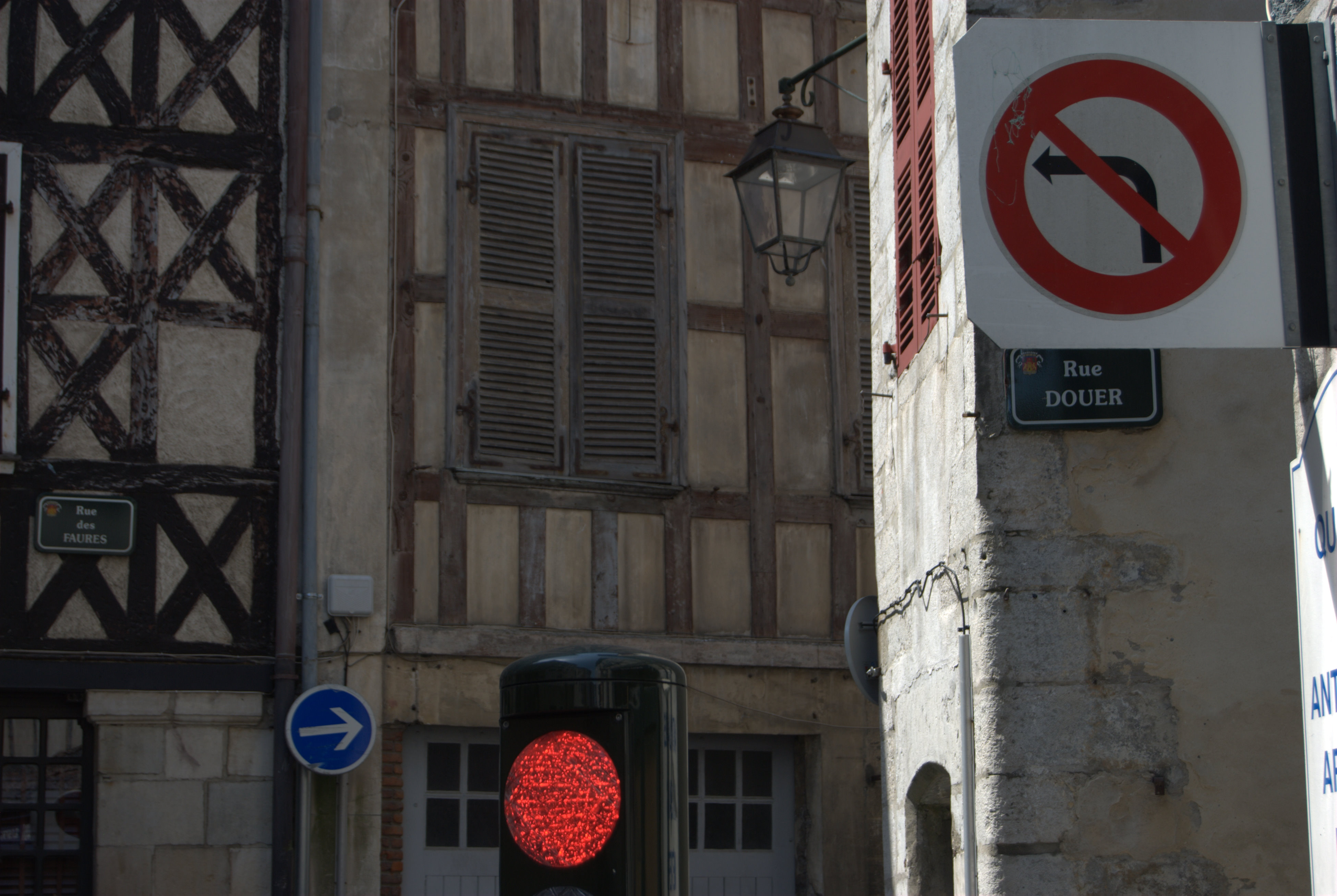 Panneau et feu de circulation, panneaux des rues des Faures et Douer.